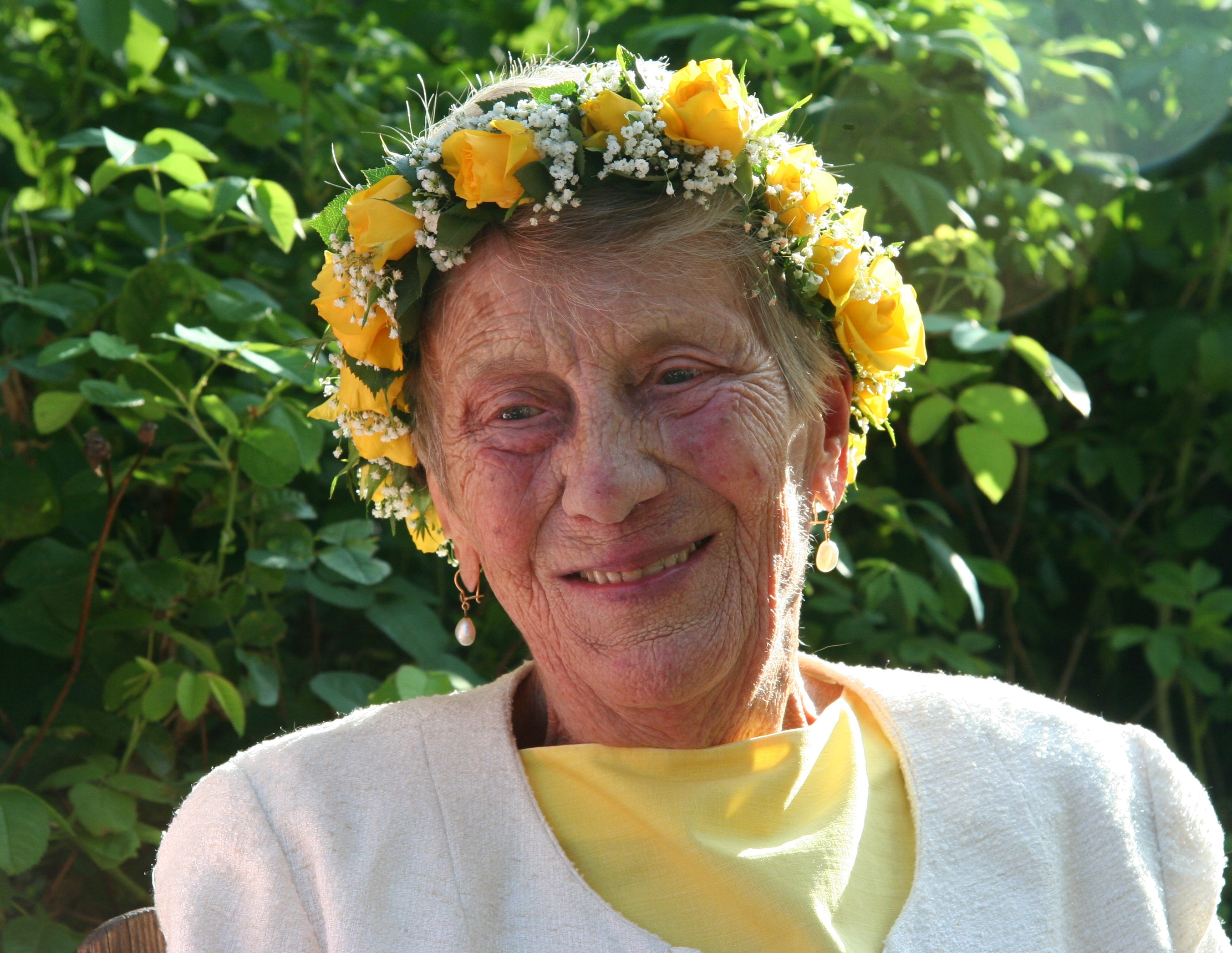 Sonja Lyttkens 90 år, Kåbo